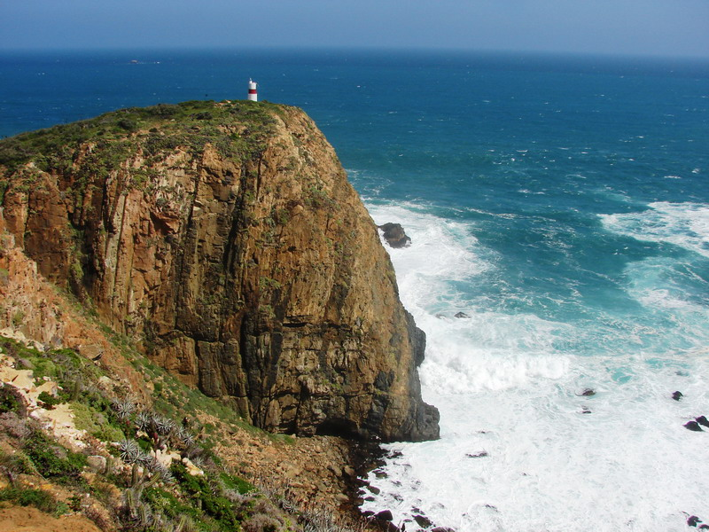 Faro Punta Tablas, 8 km al norte de Los Vilos